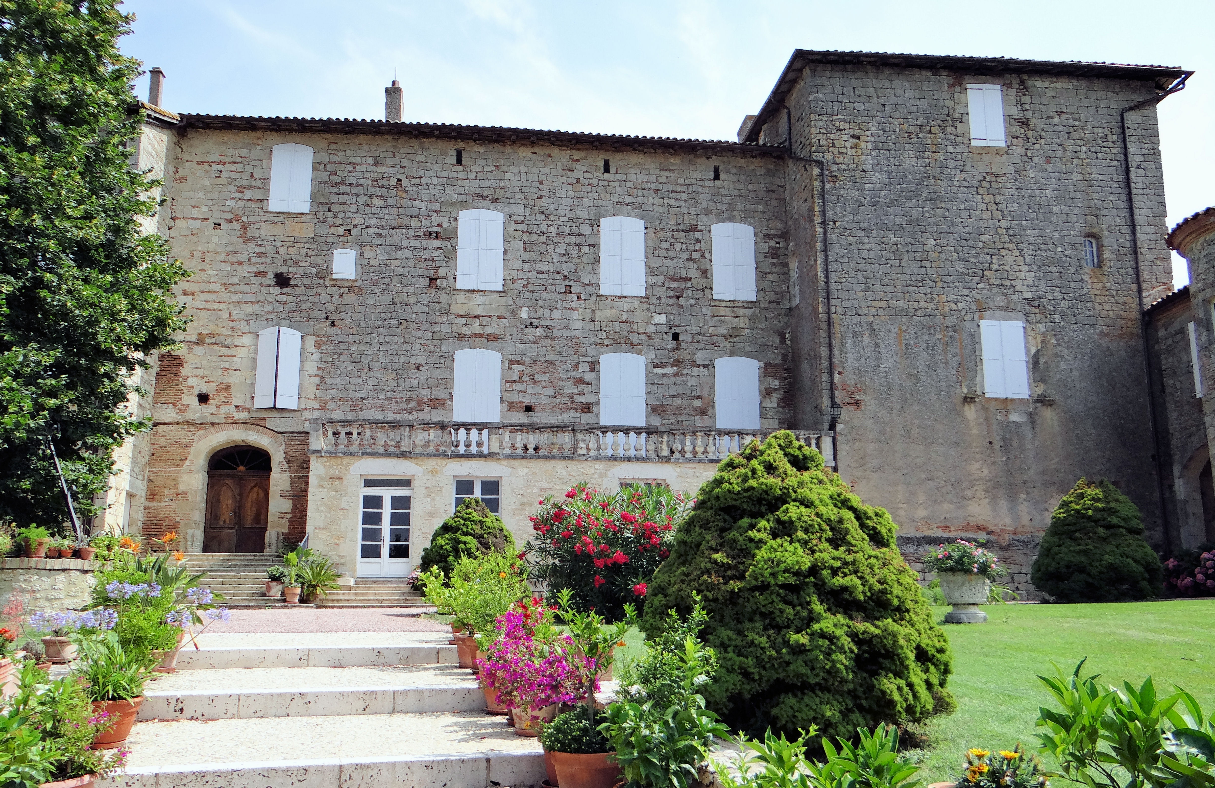 Château de Marsac (Tarn-et-Garonne) - Façade côté village